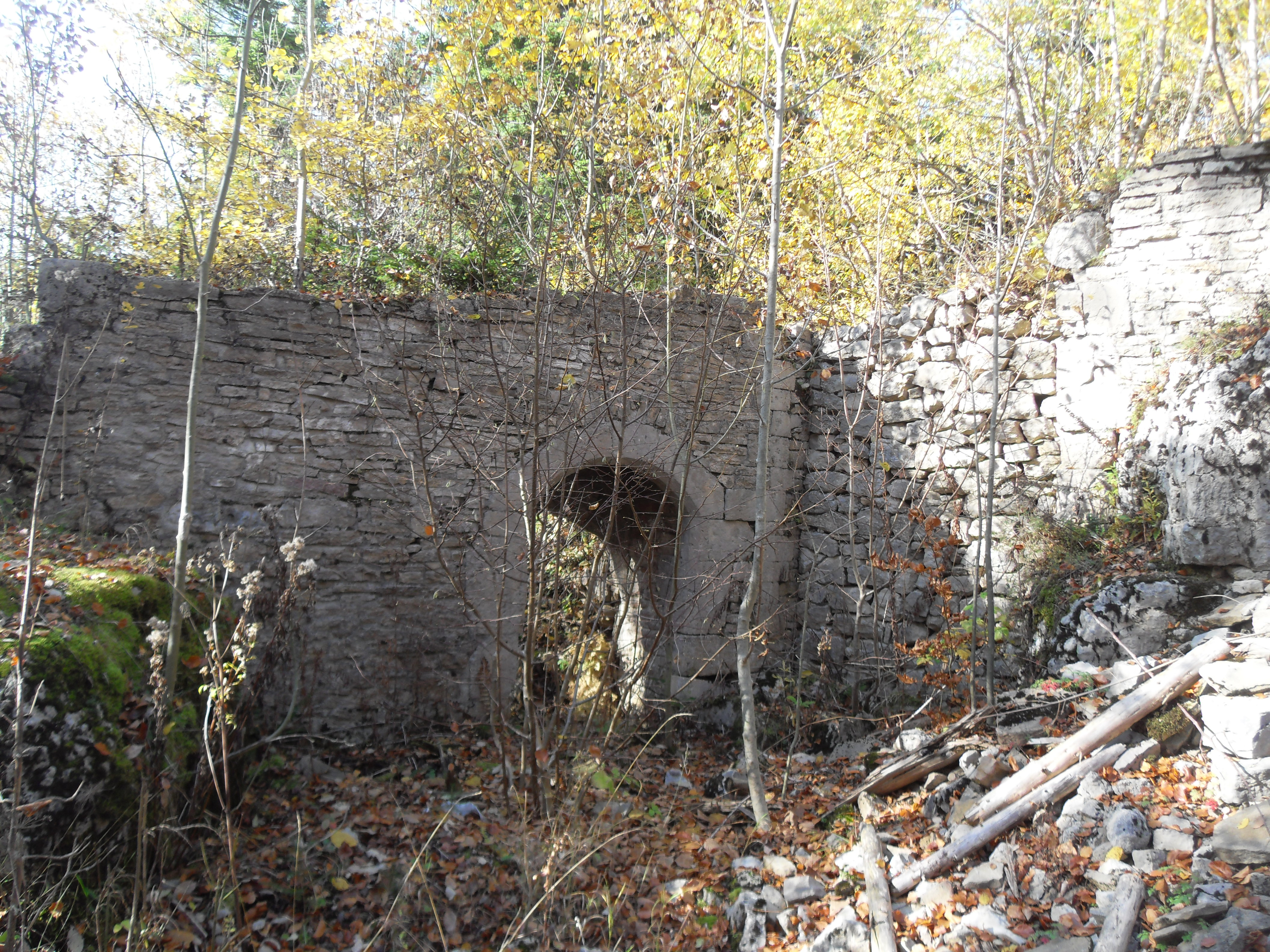 Un aperçu des ruines du Vieux Château de Maîche.